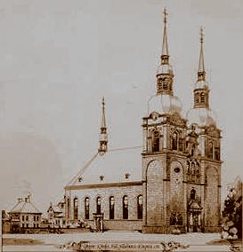 Fotolithographie Pfarrkirche St. Nikolaus Eupen